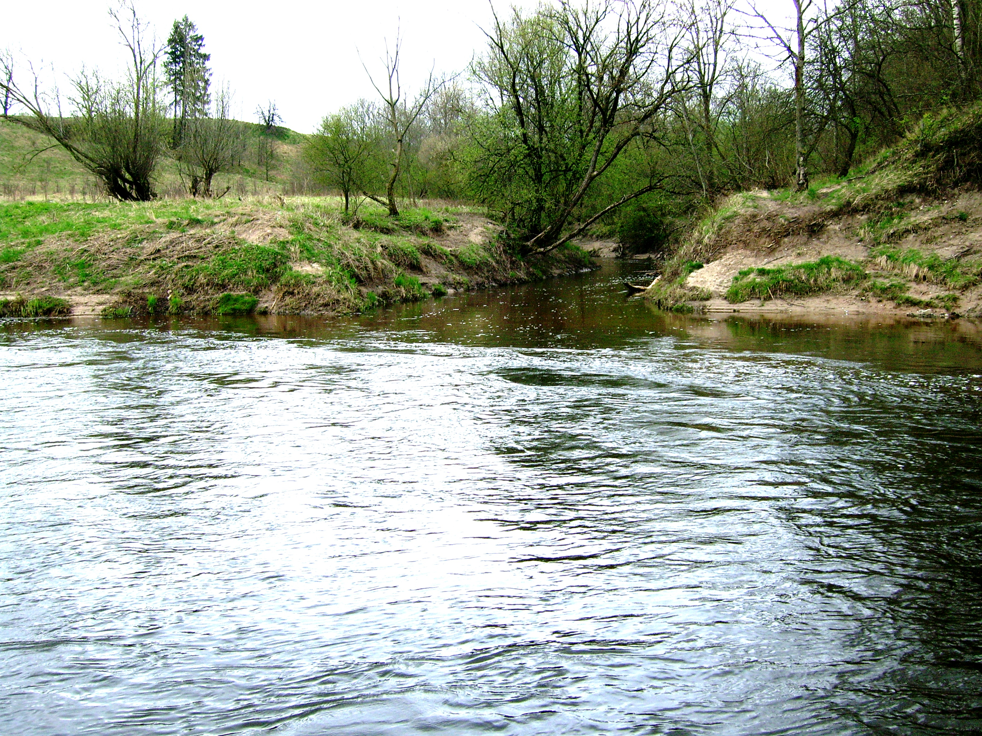 Jūros ir Šunijos santaka